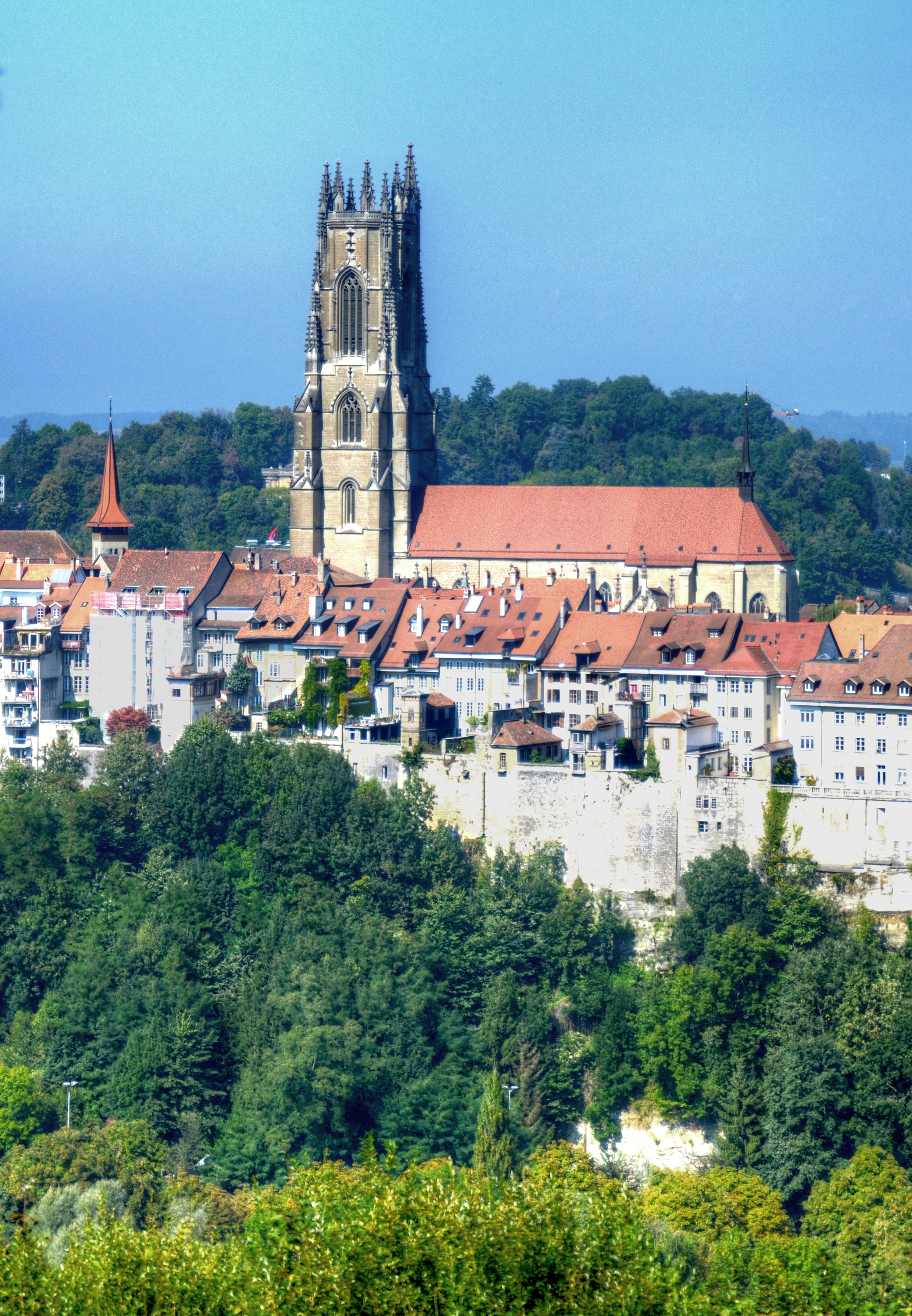 Kathedrale der Stadt Fribourg